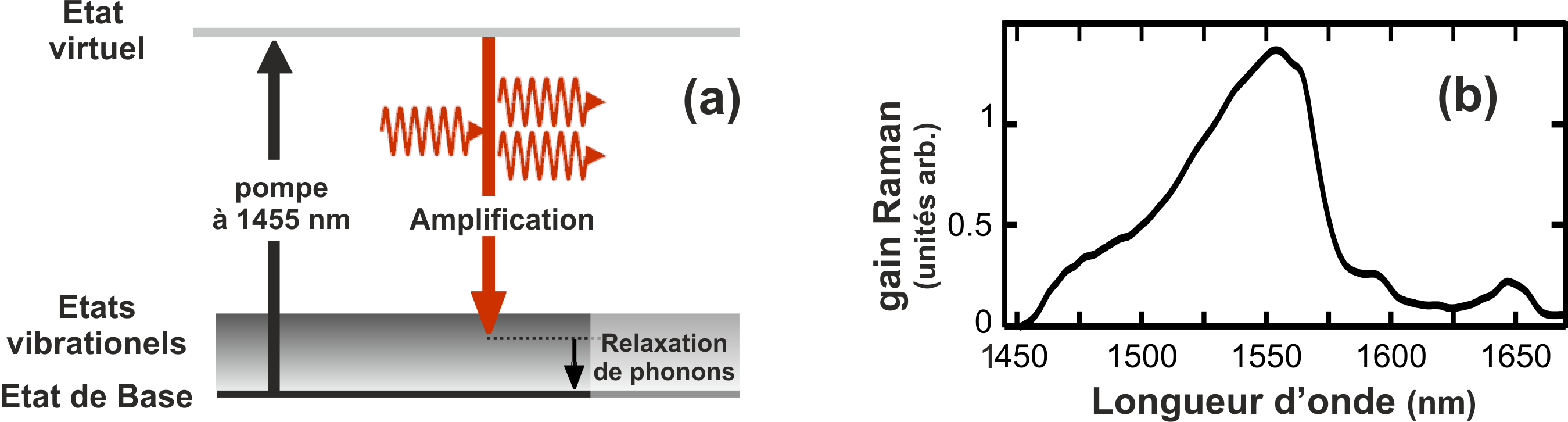 Principe de l'amplification Raman. Niveaux énergétiques et exemple de courbe de gain caractéristique aux longueurs d'ondes des télécommunications optiques